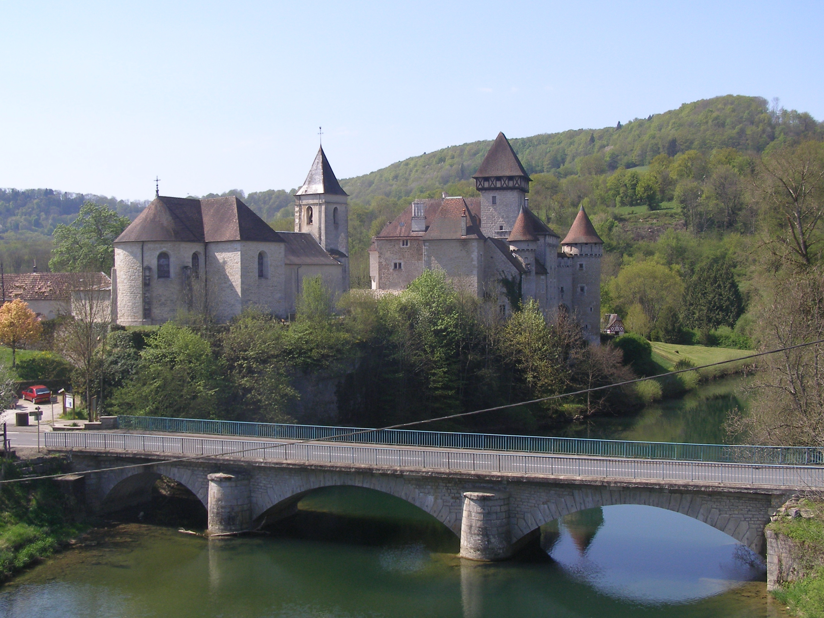 Église et château de Cléron